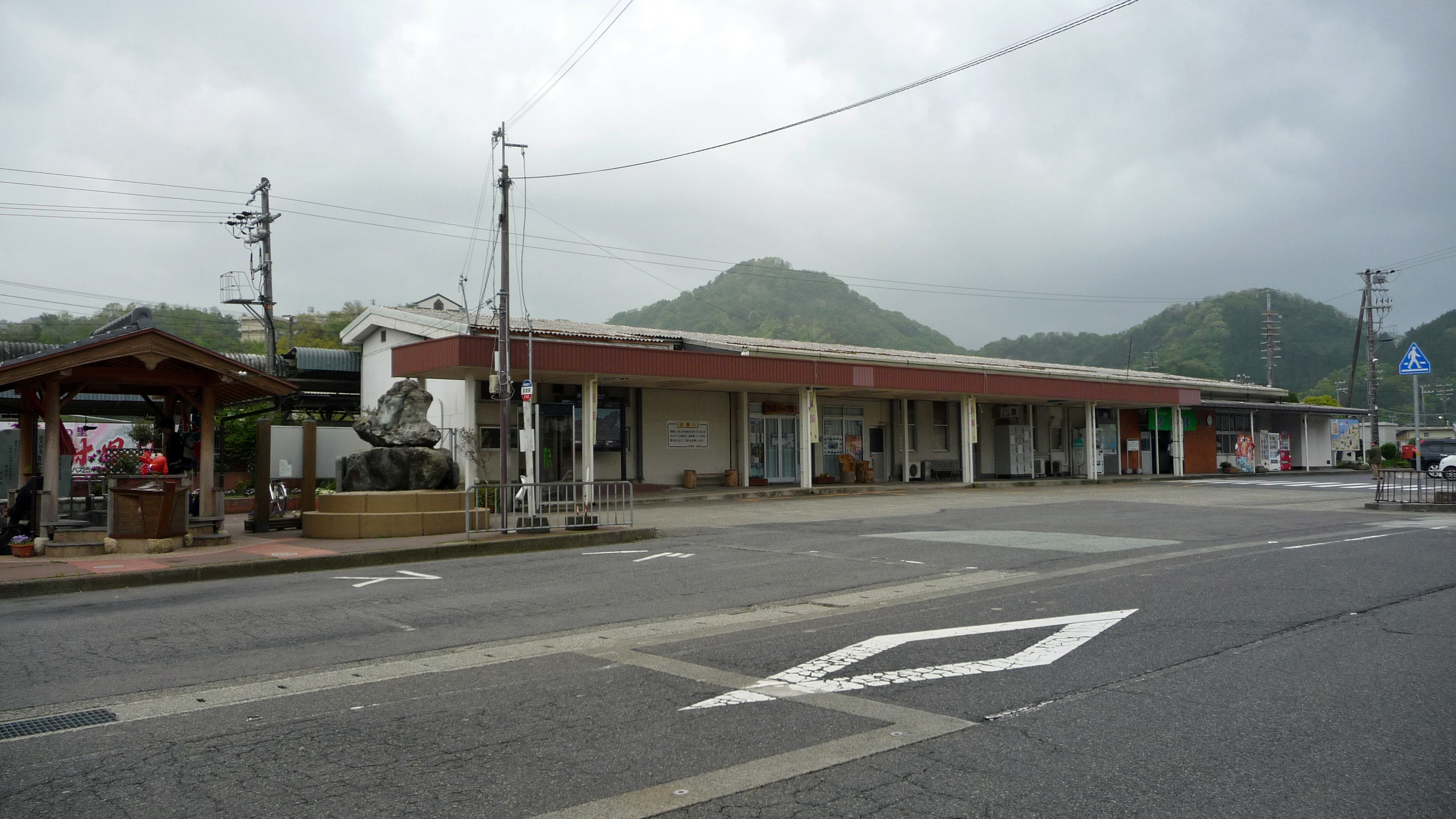 JR山陰本線浜坂駅